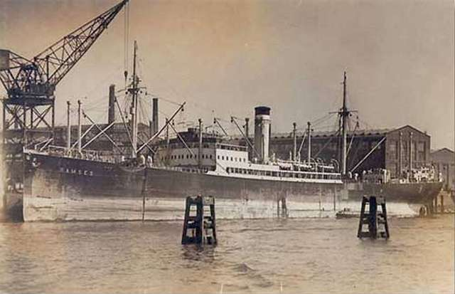 Das Motorschiff Ramses der Hapag, 1926 größtes Schiff der DDG Kosmos